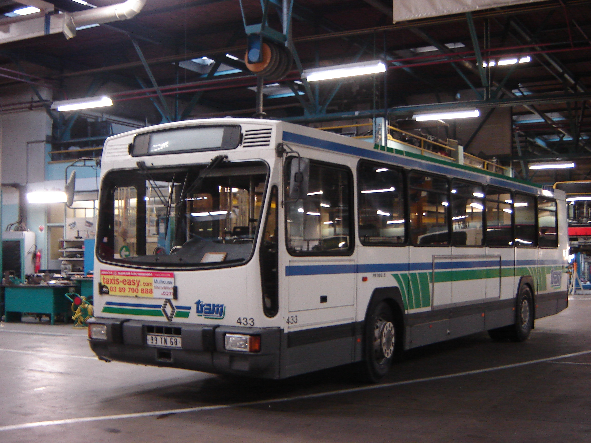 Renault PR100.2 de Mulhouse, arborant encore les couleurs de l'ancien réseau (nommé TRAM)